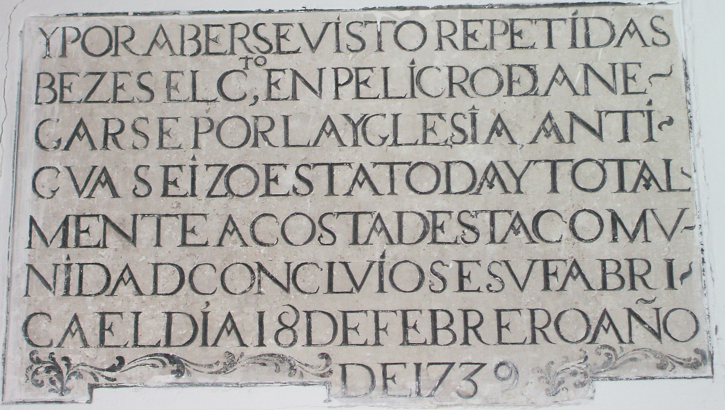 Piedra fundacional de la actual iglesia conventual de la Concepción, en Cuéllar.